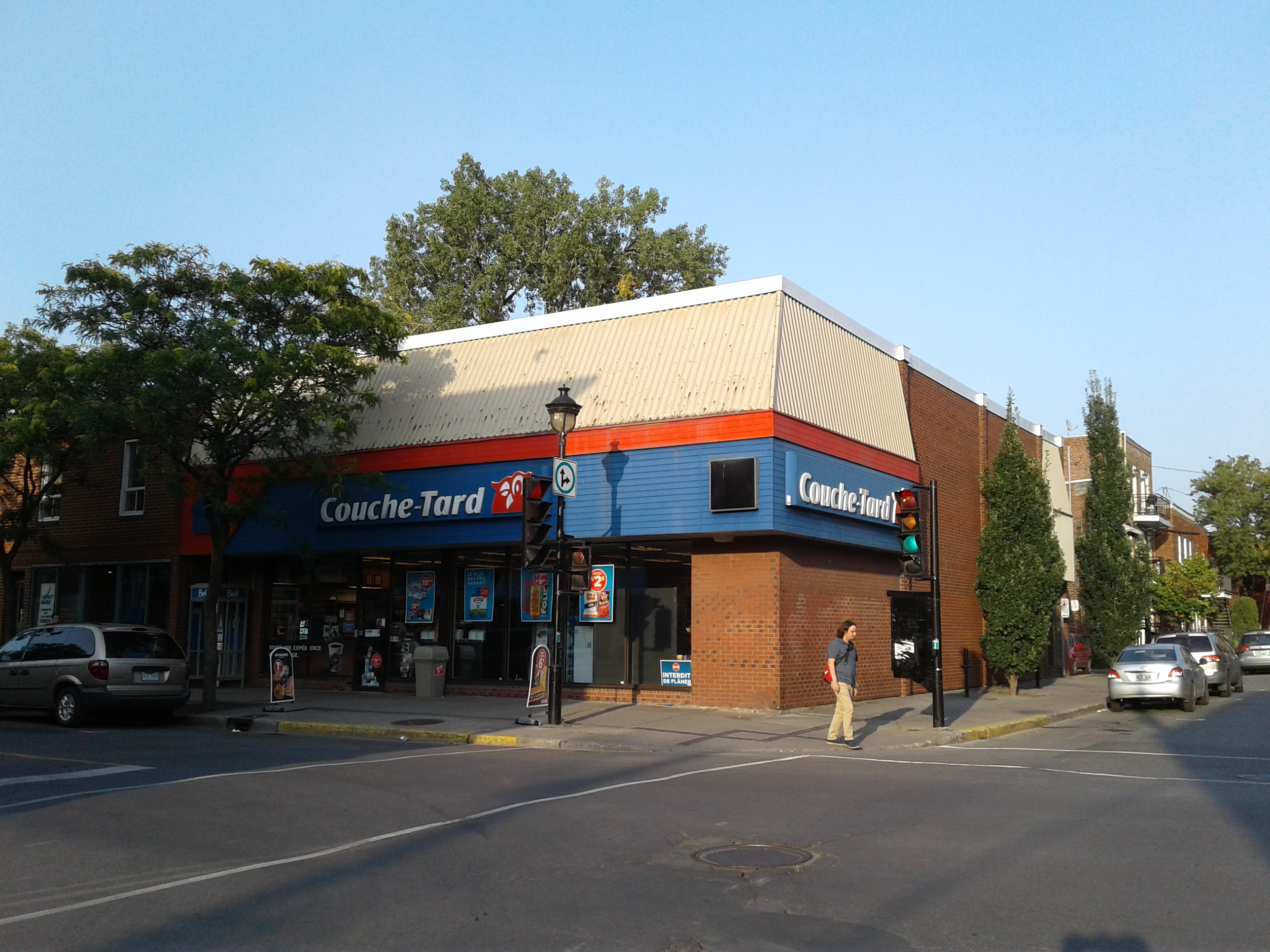 Couche-Tard, 3890, rue Wellington / rue Hickson, Verdun, Montréal